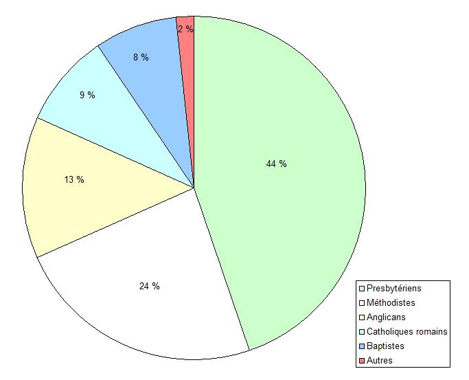 Appartenance religieuse de la population de Gladstone (Manitoba, Canada), en 1891.